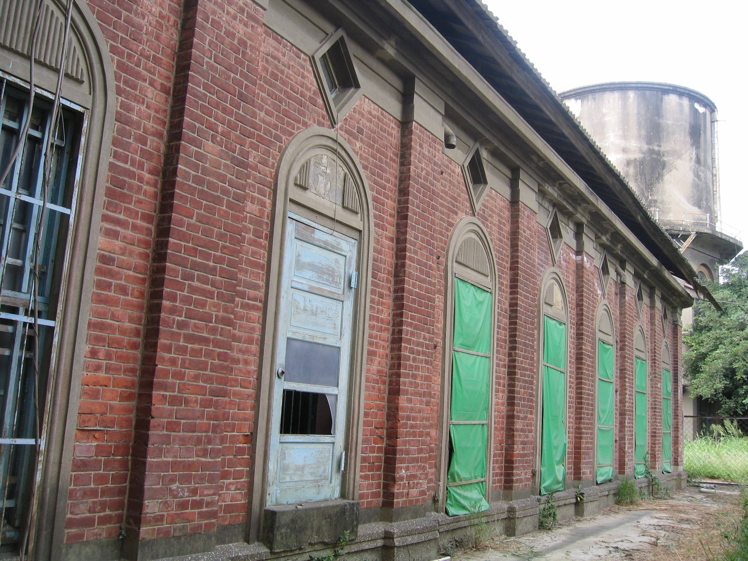 北港自來水廠唧筒室